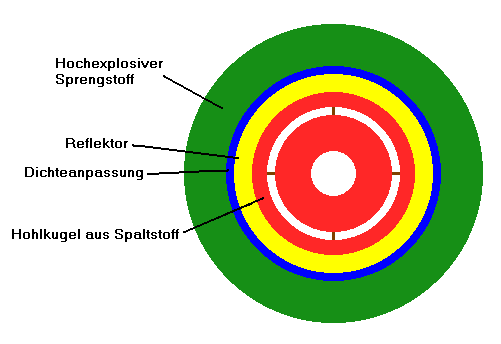 Implosionsbombe4